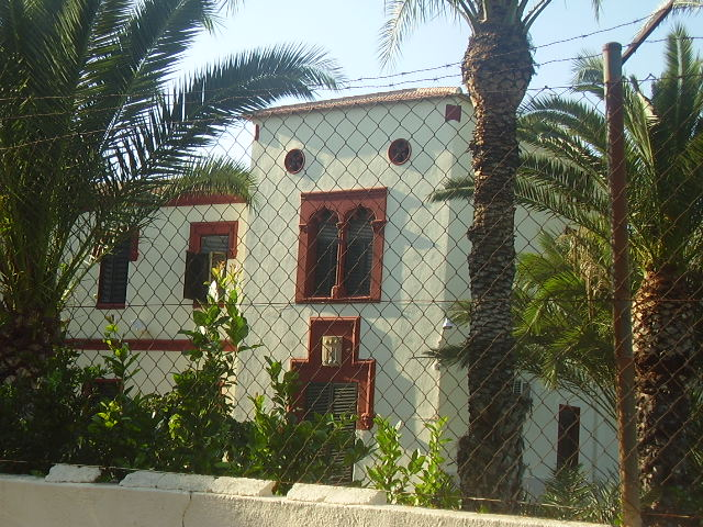 Fachada principal del palacete D´Estoup de Las Torres de Cotillas